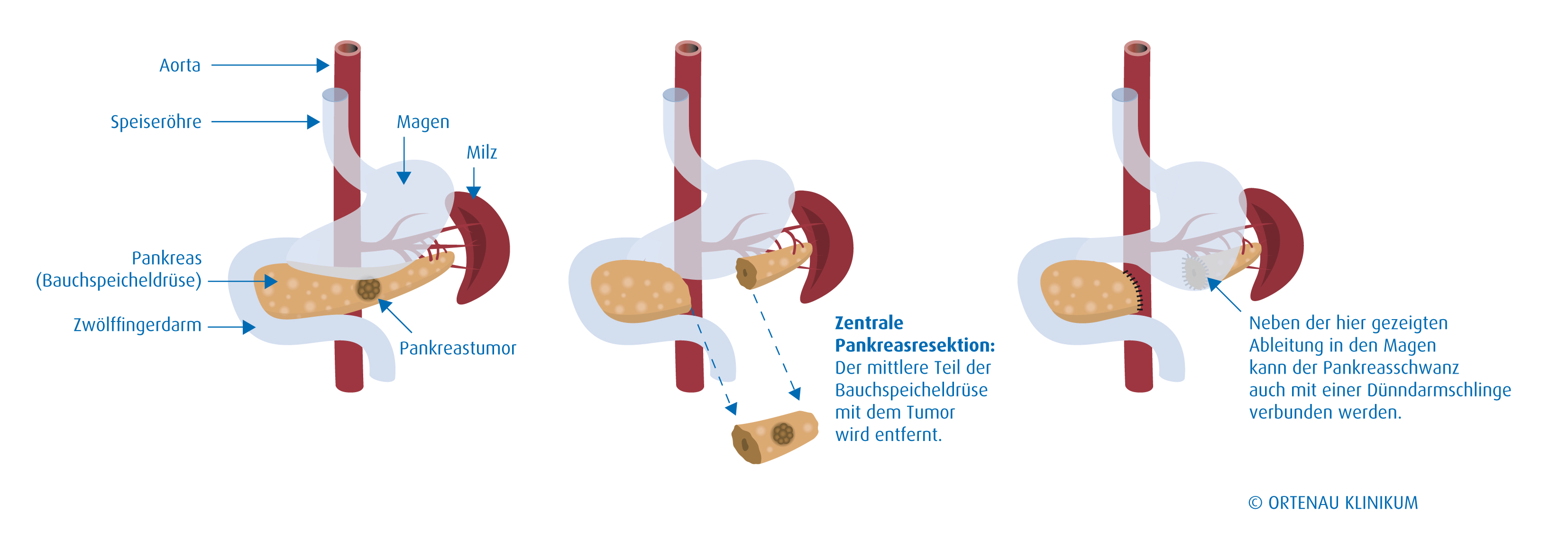 Modellhafte Darstellung einer Teilentfernung der Bauchspeicheldrüse